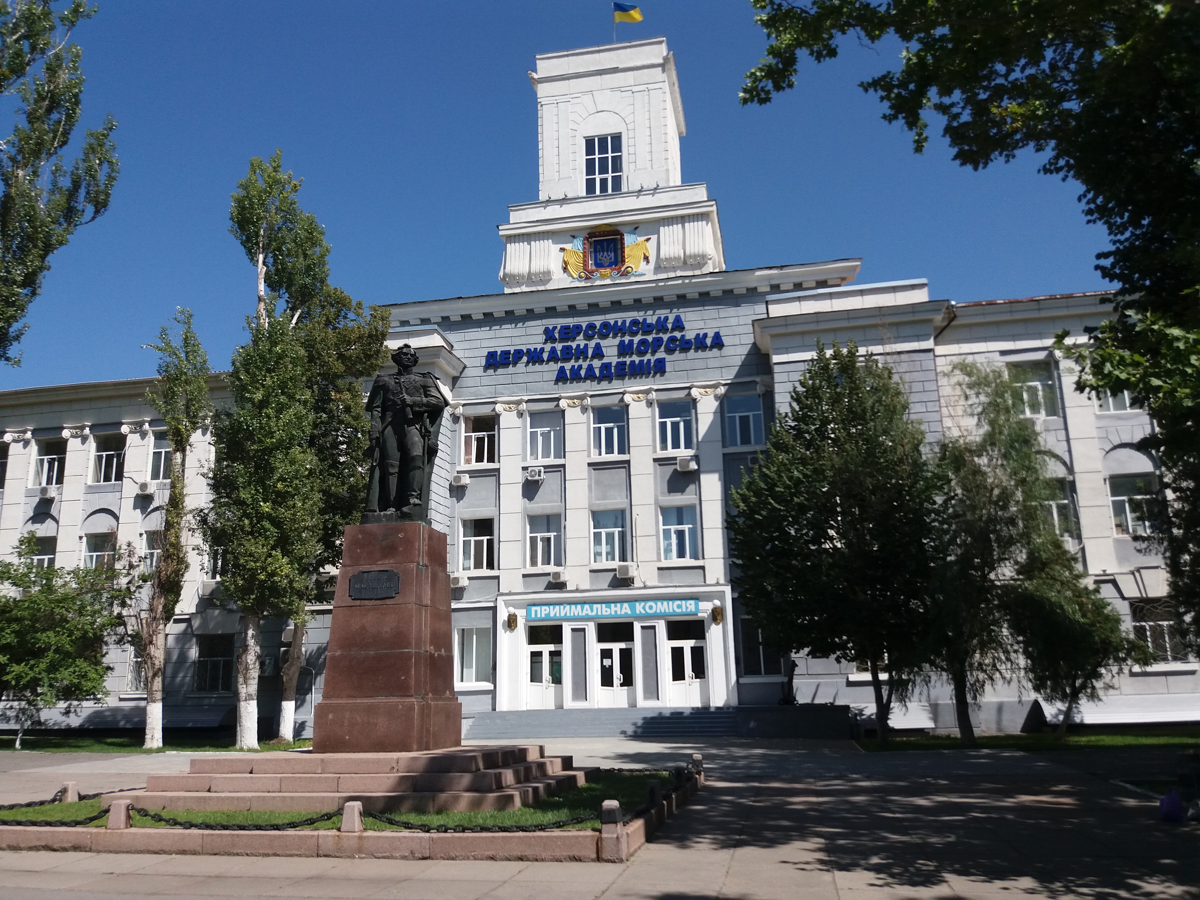 Пам'ятник адміралу Ф. Ф. Ушакову, Херсон, пр-т Ушакова